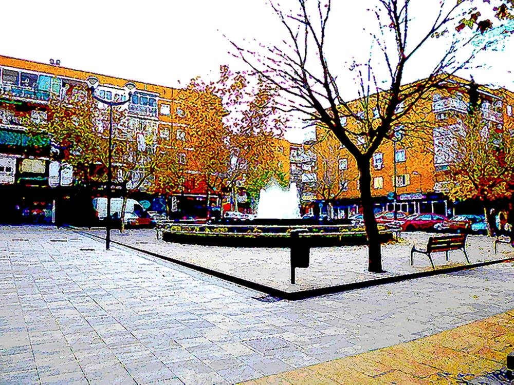 Fotografía tomada en el otoño de 2014 tratada digitalmente como imagen acuarelada.